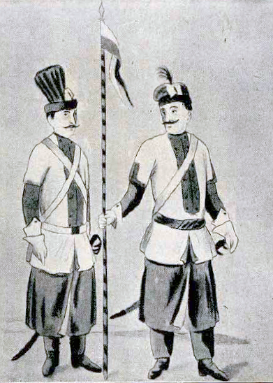 Ułan i pocztowy pułku ułanów nadwornych płk Józefa Bielaka - sztych z 1781 r